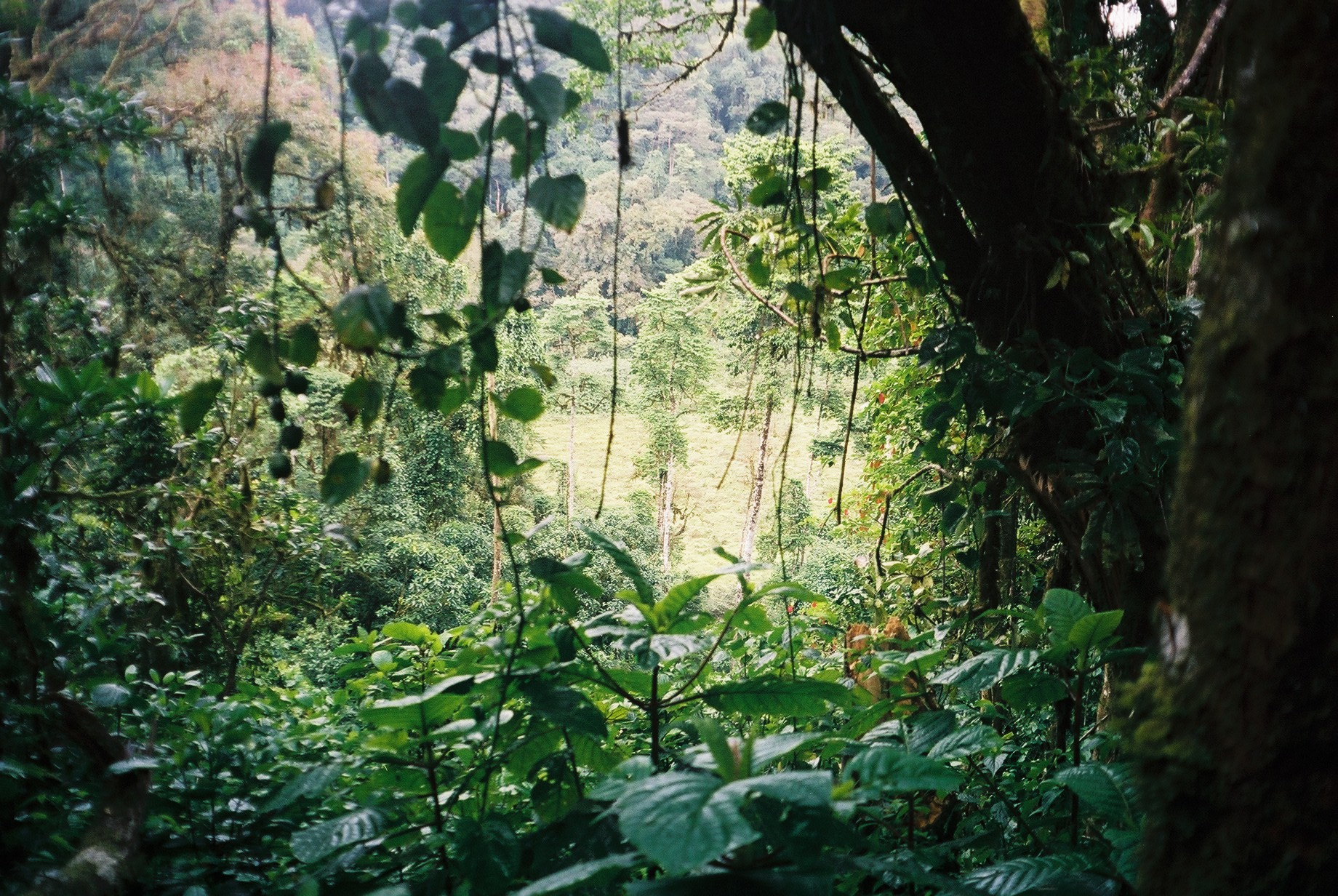 Lagoa Amélia, Óbo, São Tomé e Principe